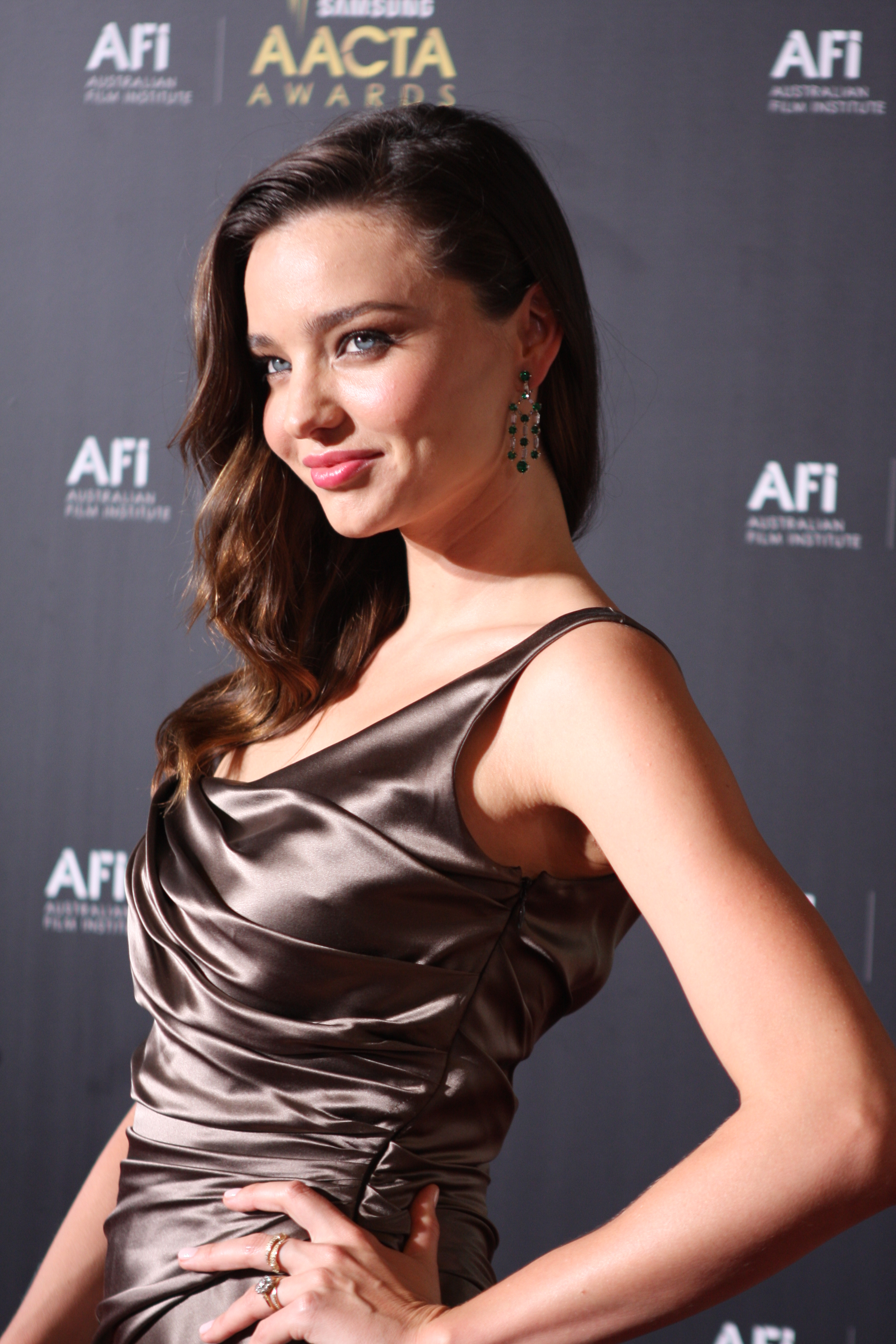 Miranda Kerr